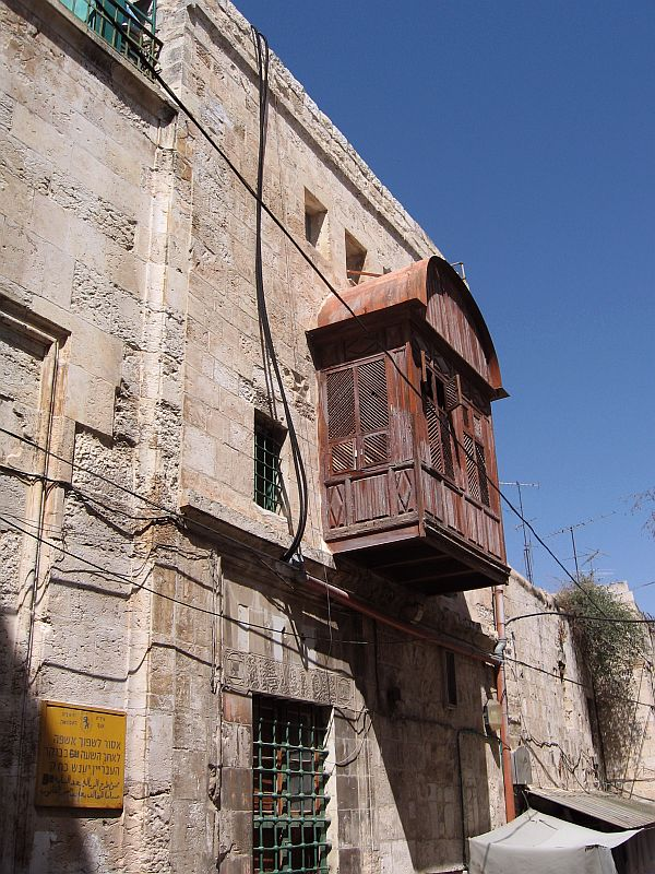 העיר העתיקה בירושלים (בערבית: بلدة القدس القديمة, נהגה: בִּלִדַת אֶלקוּדְס אֶלקָדִימָה) היא האזור העירוני העתיק של ירושלים. שטחה המוקף על ידי חומות ירושלים הוא כ-850 דונם.כמו כן נכללים בעיר העתיקה הר ציון ועיר דוד, הנמצאים מחוץ לחומות, בסמוך ומצד דרום. העיר העתיקה מהווה מוקד משיכה מרכזי לתיירים בני דתות ואומות שונות, אשר באים מרחבי העולם לבקר את האתרים הקדושים הנמצאים בה, ובהם: הר הבית, הכותל המערבי וכנסיית הקבר.